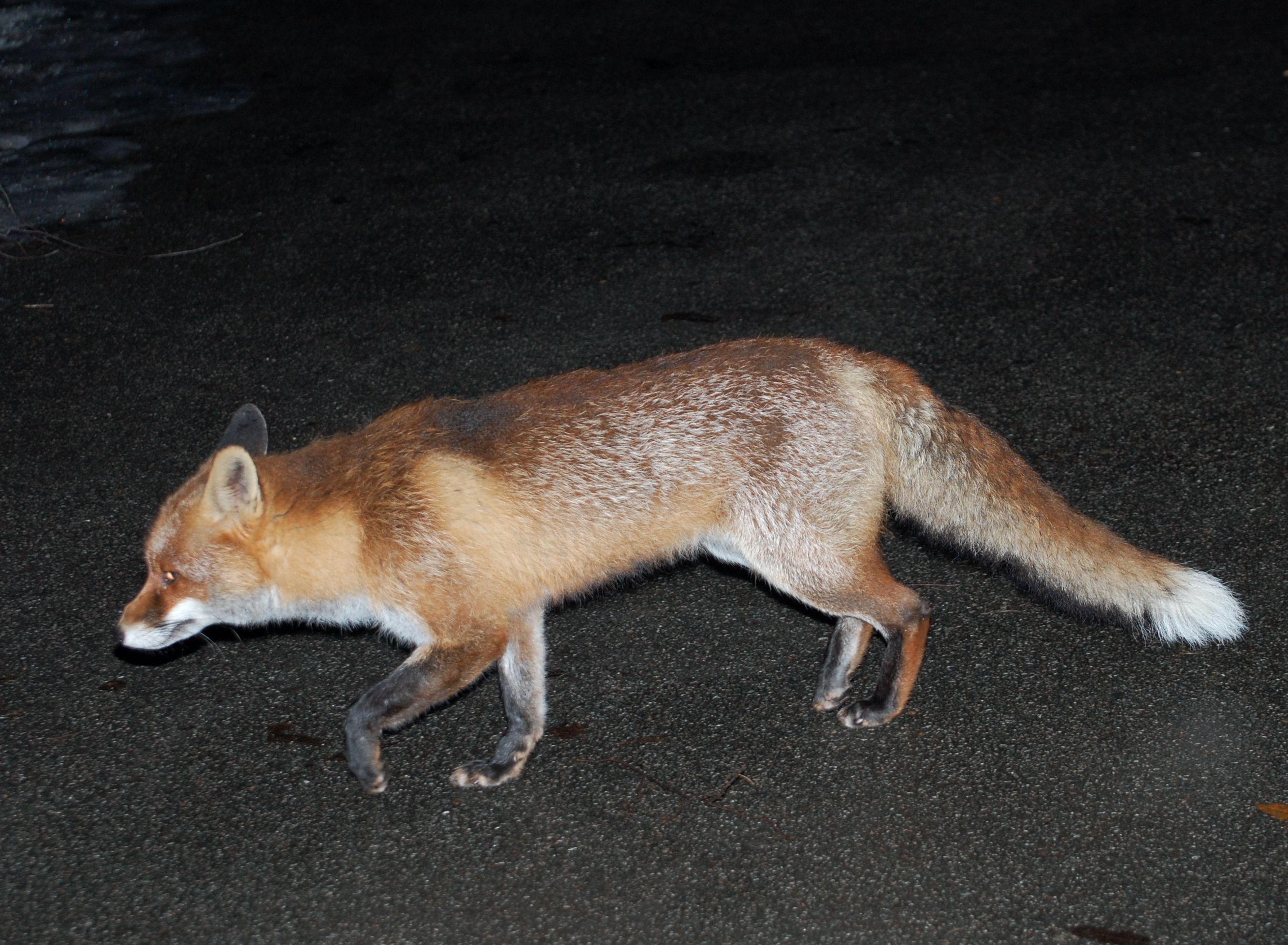 Rotfuchs, ad., Berlin-Reinickendorf